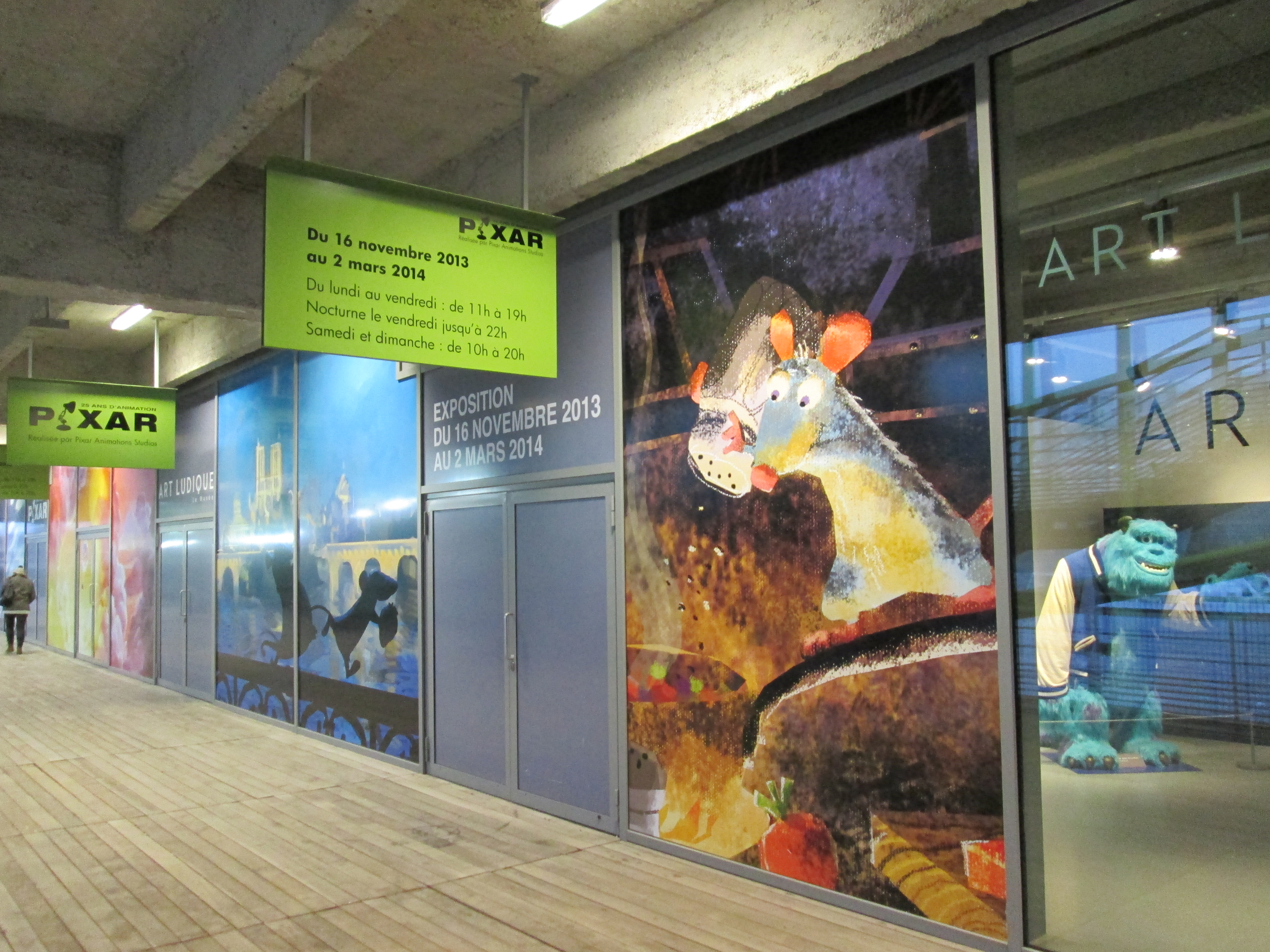 Voici l'extérieur d'Art Ludique - Le Musée, durant l'exposition consacrée à Pixar.